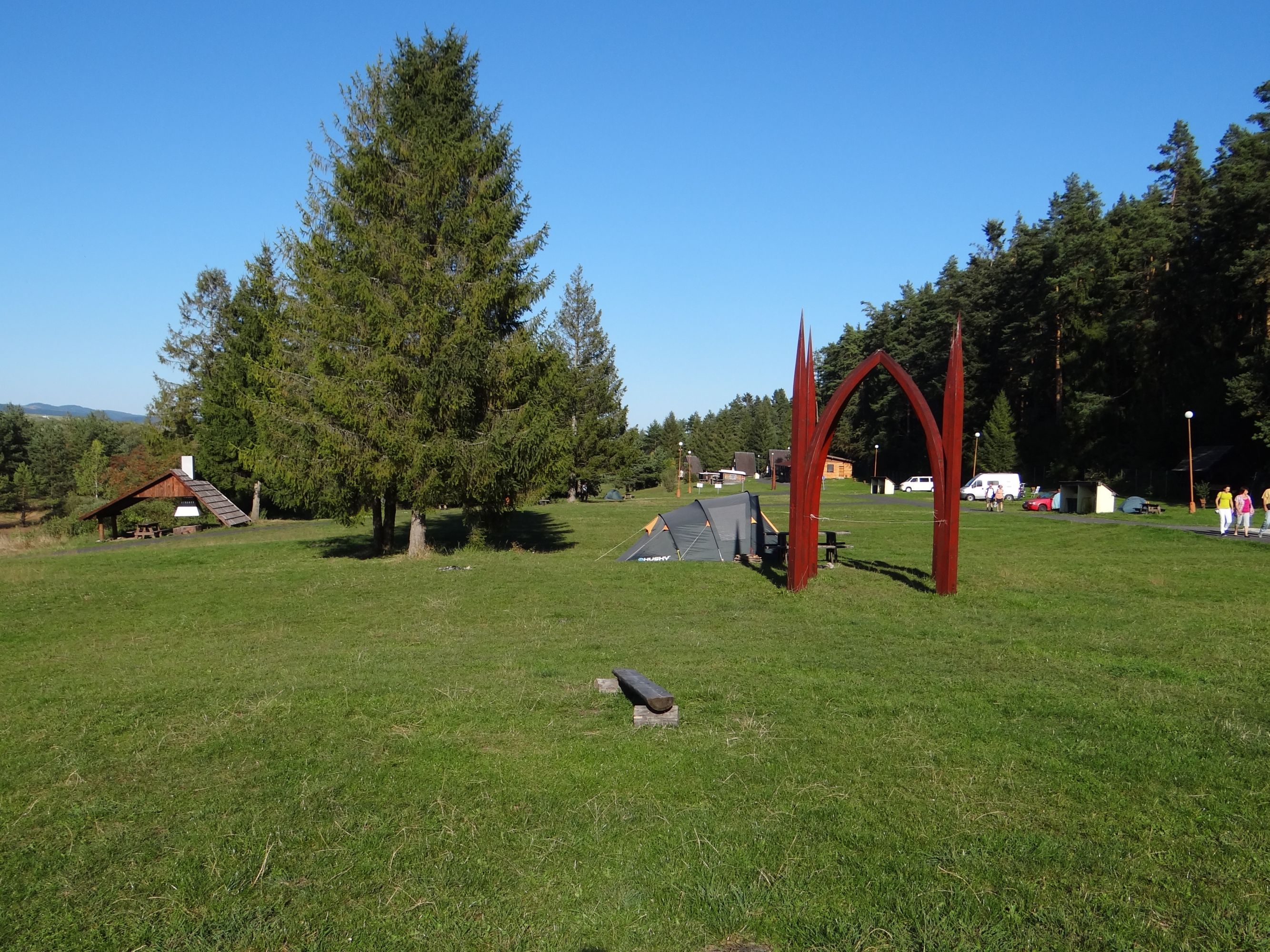 Podlesok